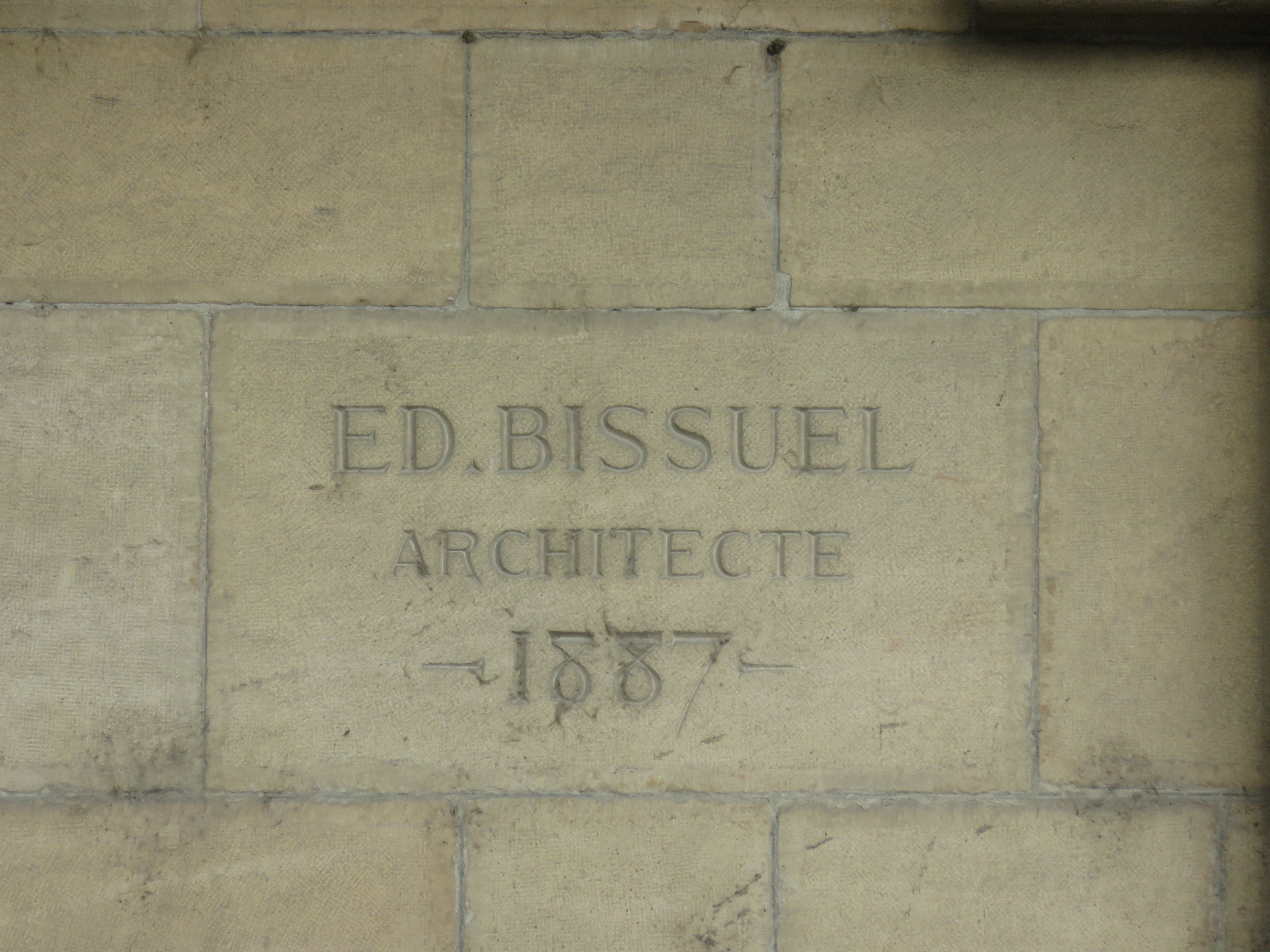 Inscription de l'architecte Prosper-Édouard Bissuel de 1887, quai Général Sarrail, dans le 6e arrondissement de Lyon.